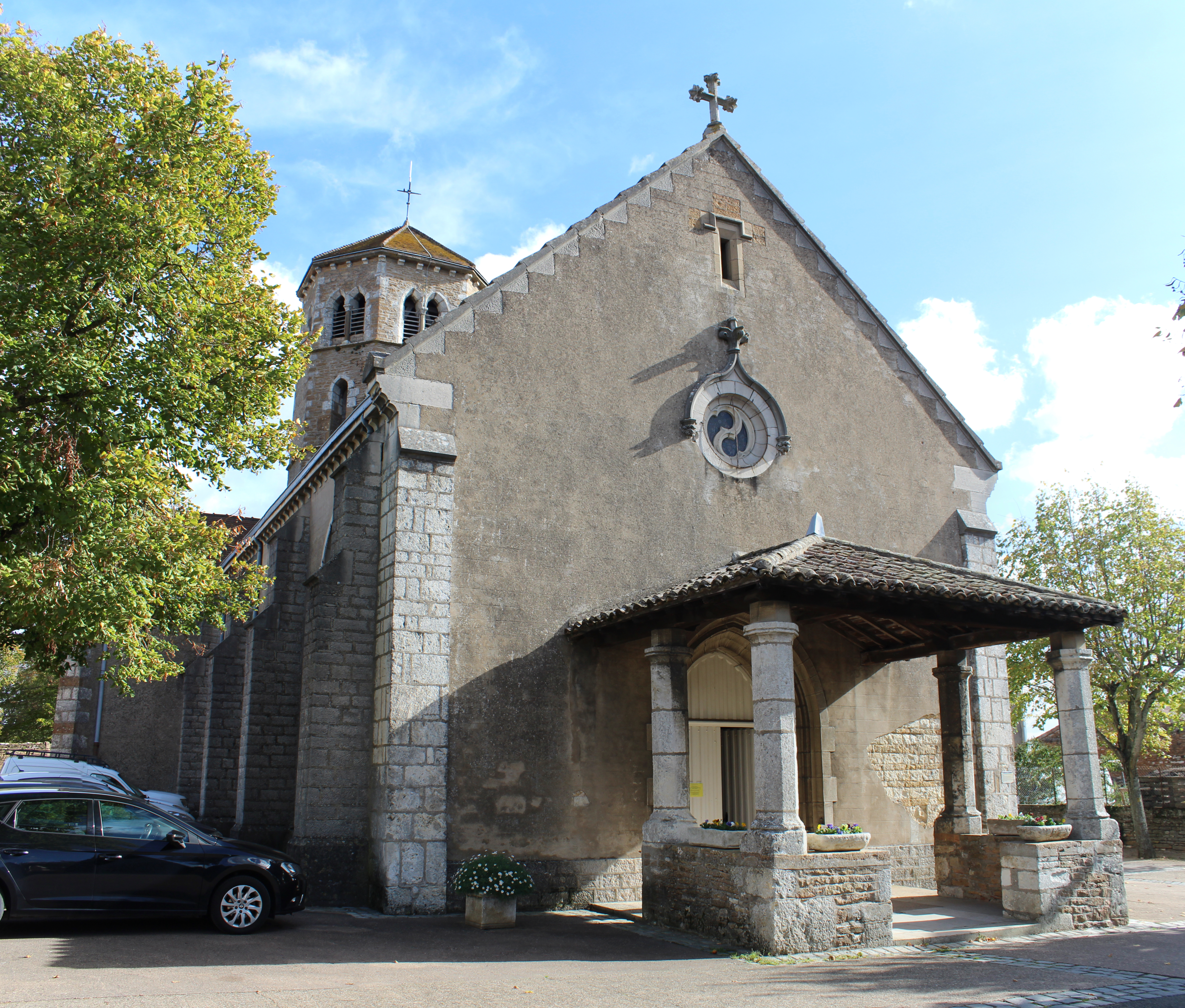 Église Sainte-Marie d'Hurigny.